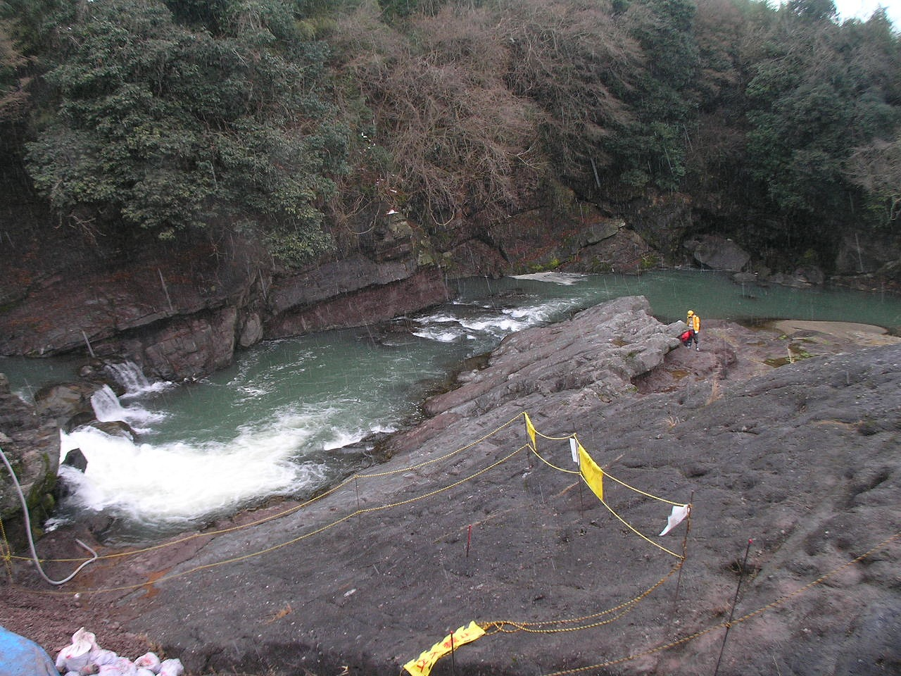 発掘現場の下流側・丹波竜の発見された現場の第二次発掘調査